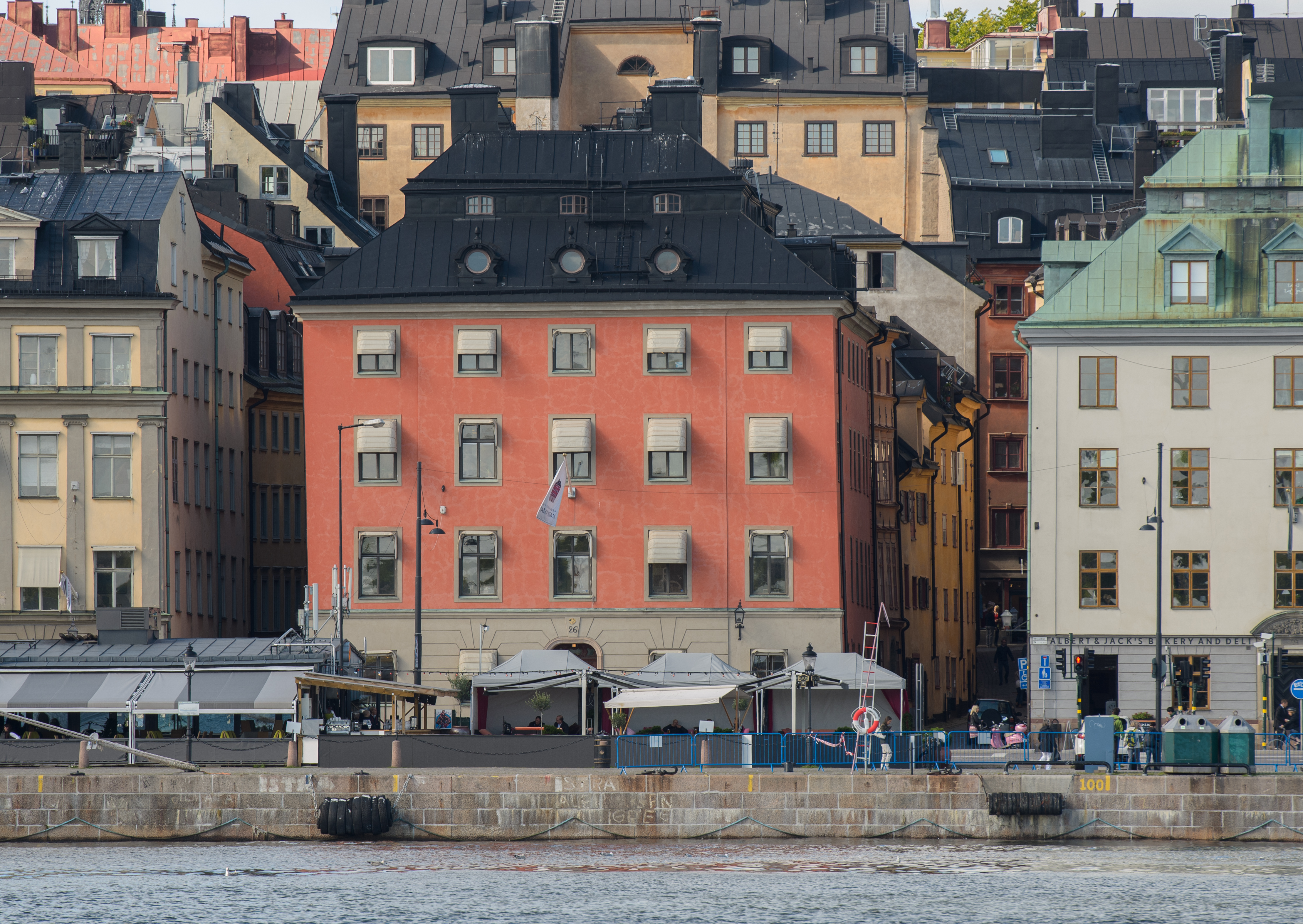 Skeppsbron 26, Gamla stan (Old town), Stockholm.